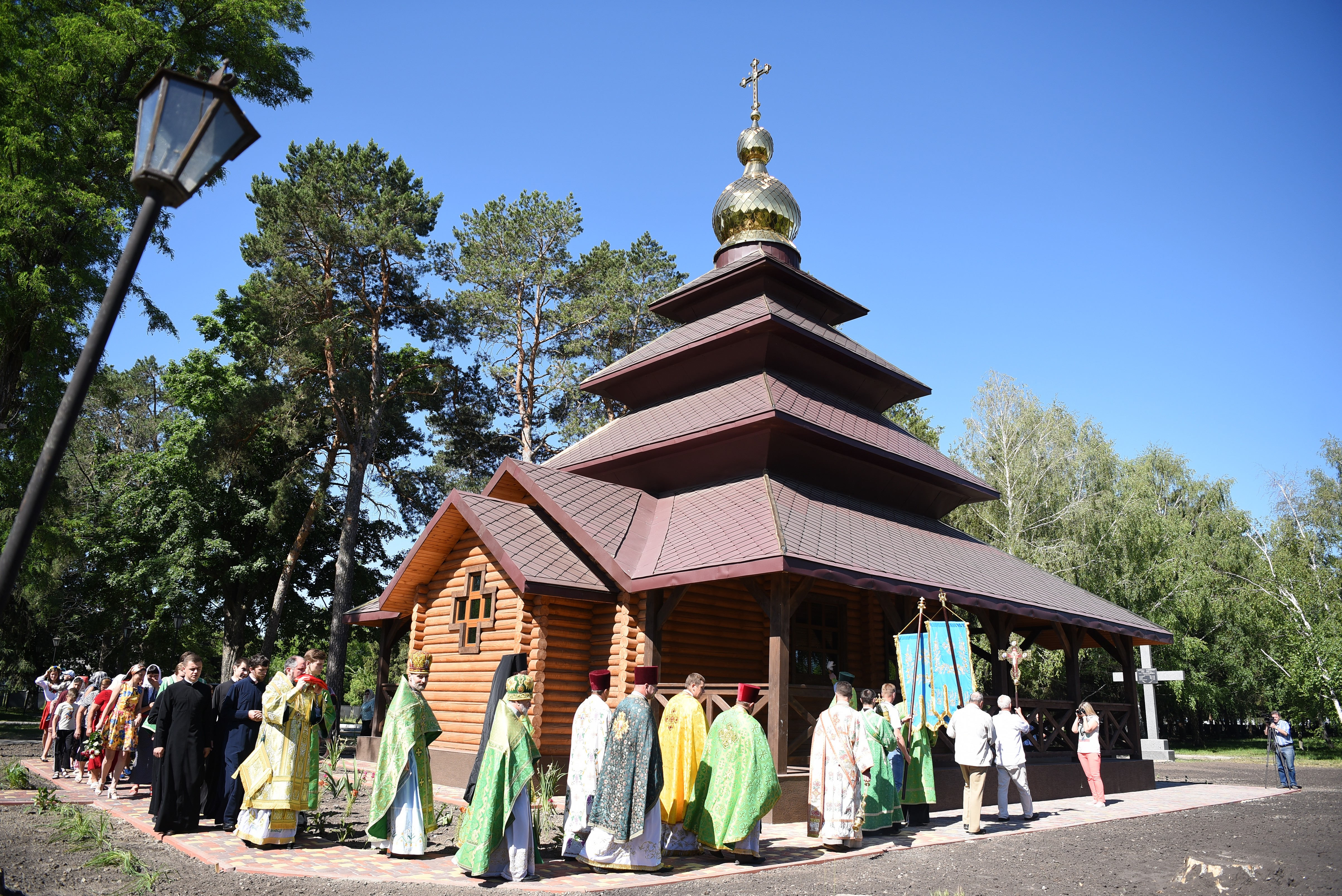 Храм на честь Покрови прсв. Богородиці